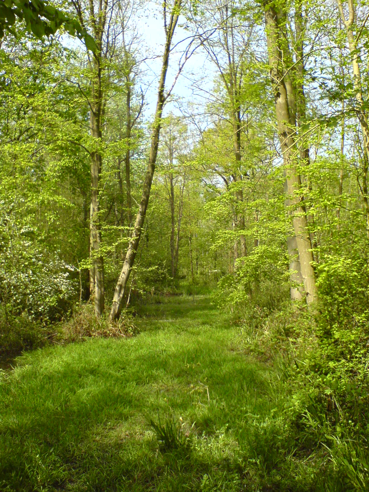 Aperçu de la Forêt de Nieppe